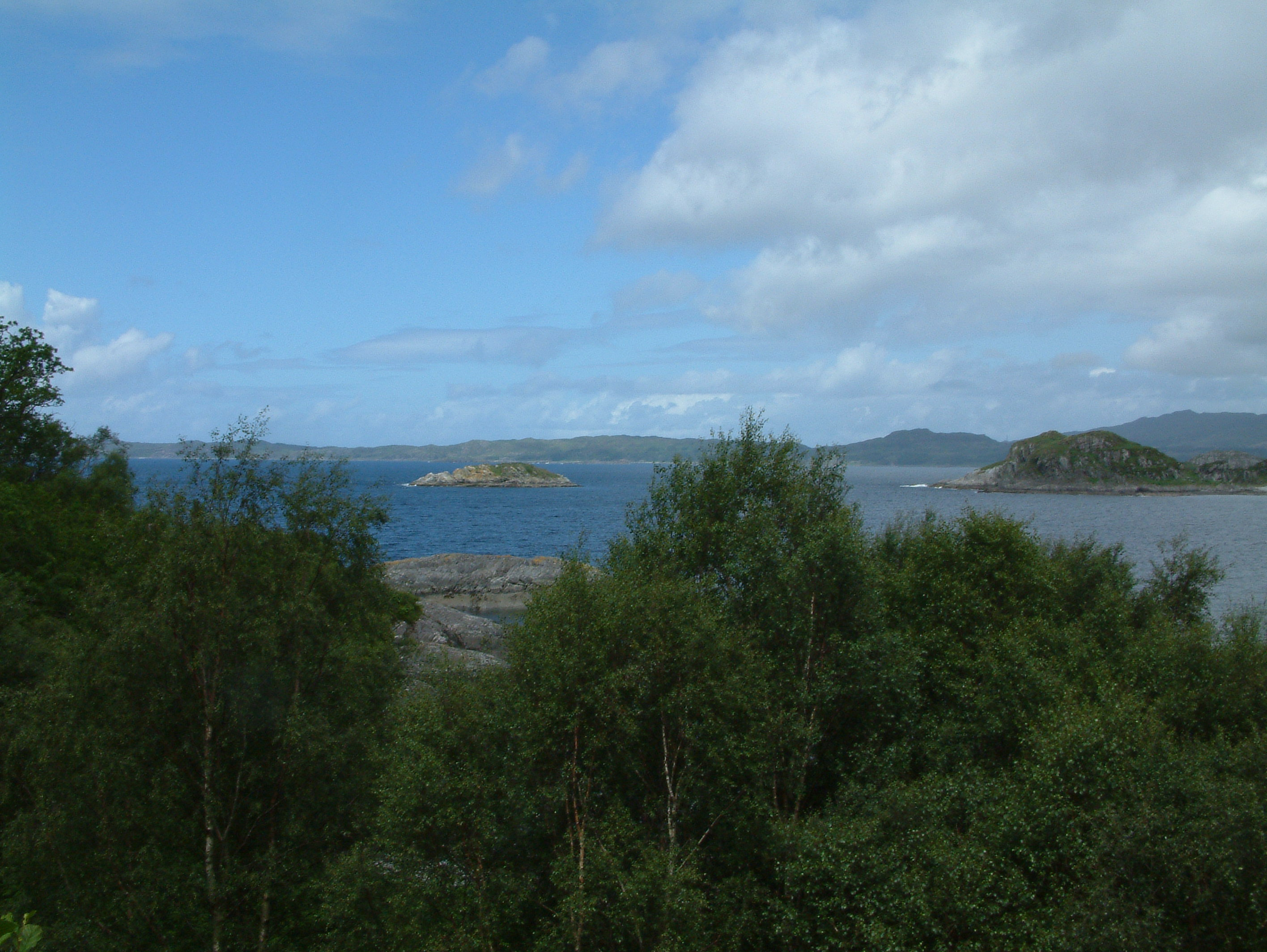 own work, StaraBlazkova 2006